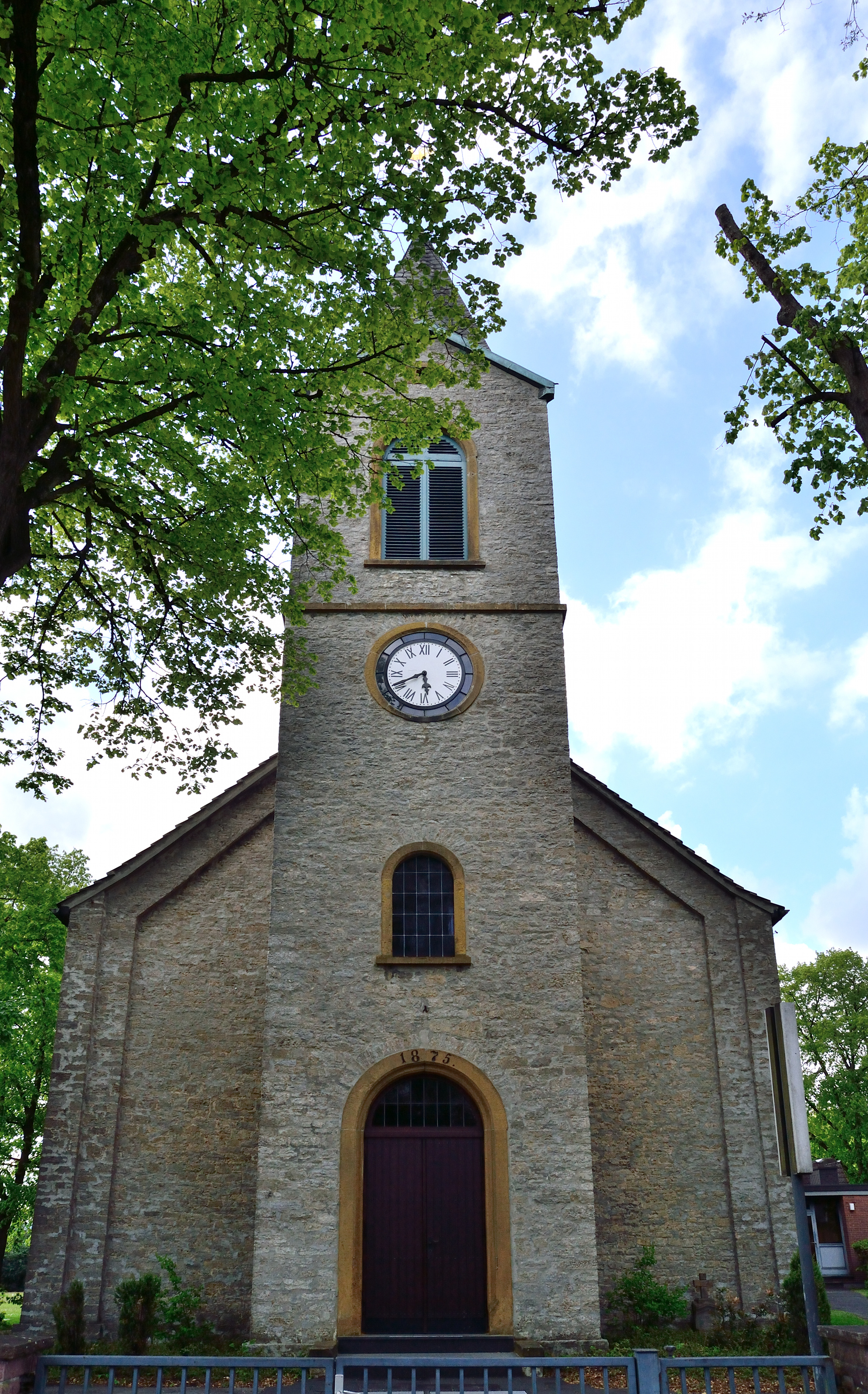 This is a photograph of an architectural monument. Evangelische Kirche Augustdorf